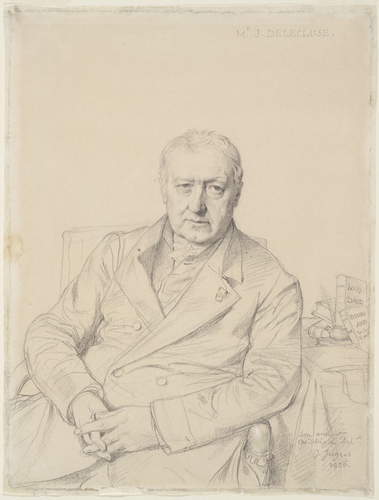 Ingres, portrait d'Étienne-Jean Delécluze dessin au crayon sur papier crème Fogg Art Museum